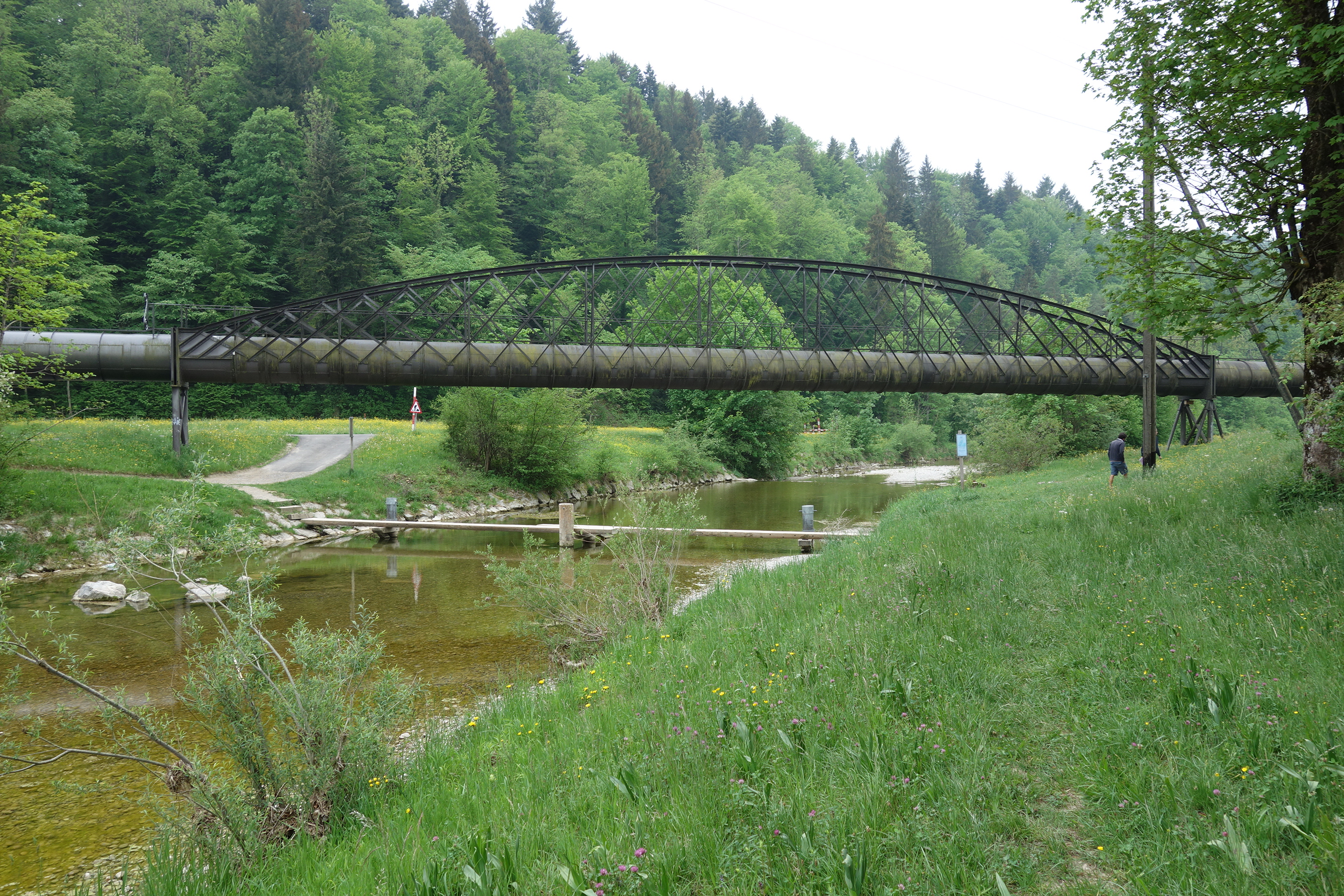 Obere Spinnerei Kollbrunn, Kollbrunn ZH, Schweiz